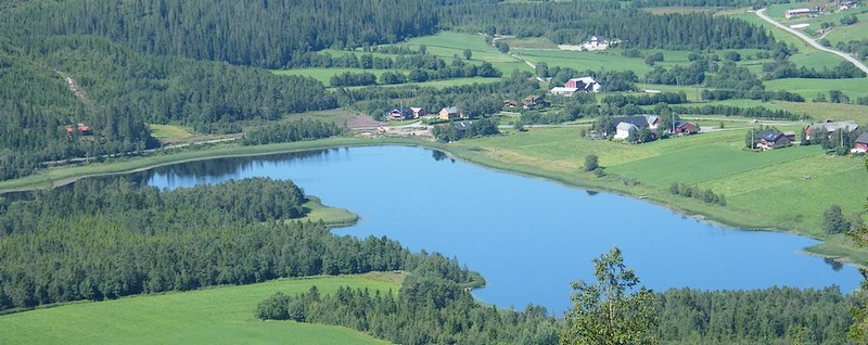 Bilde av innsjøen Lauja tatt fra øst.